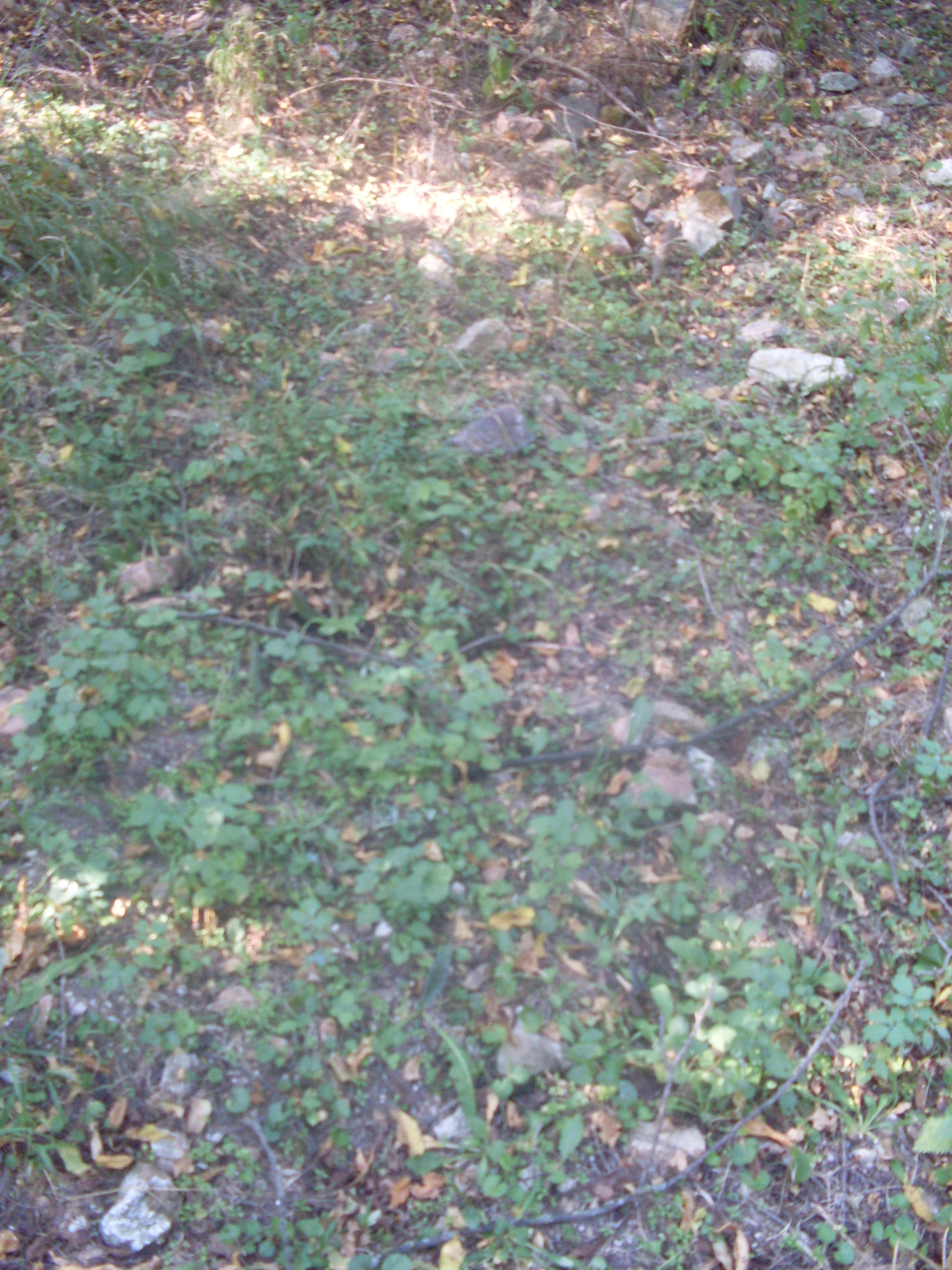 Așezarea (Cetatea) de la Ceala, Arad.